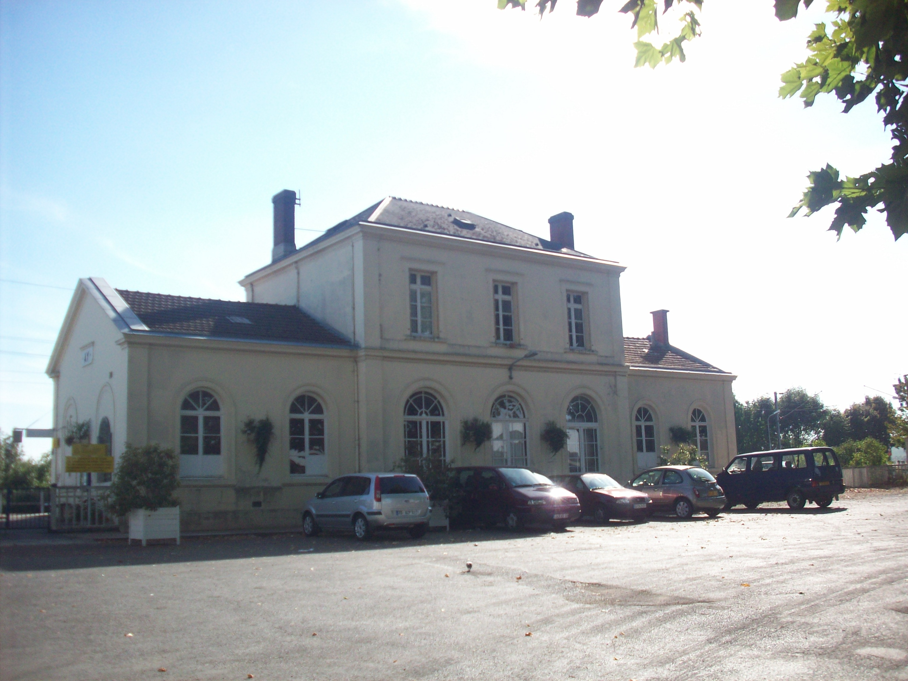 Gare d'Aÿ